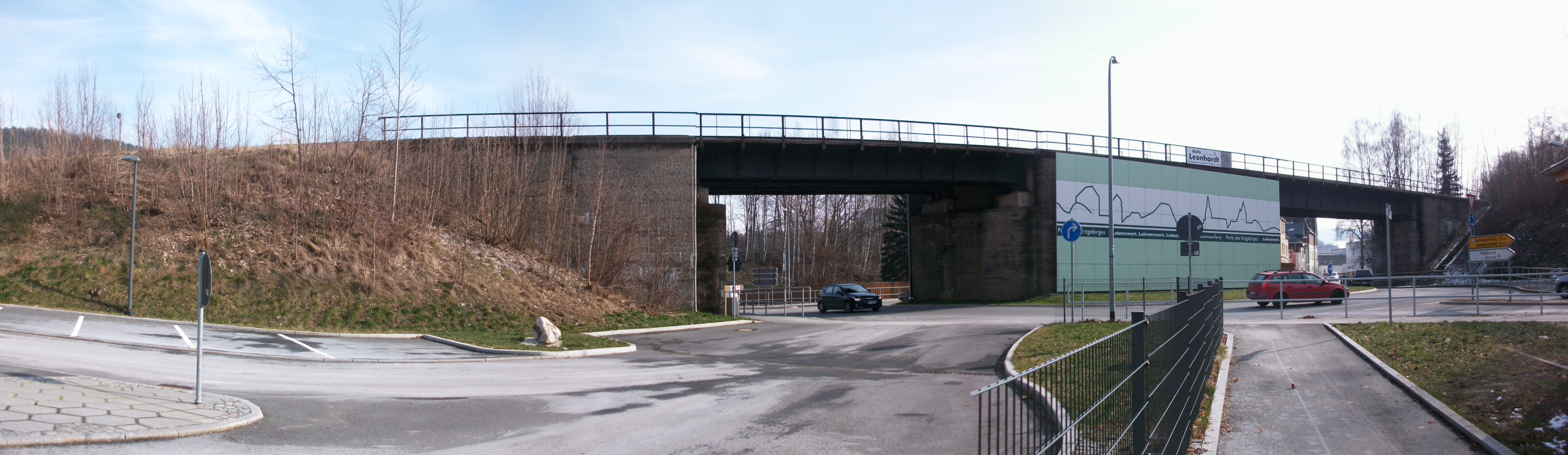 Viadukt Schwarzenberg